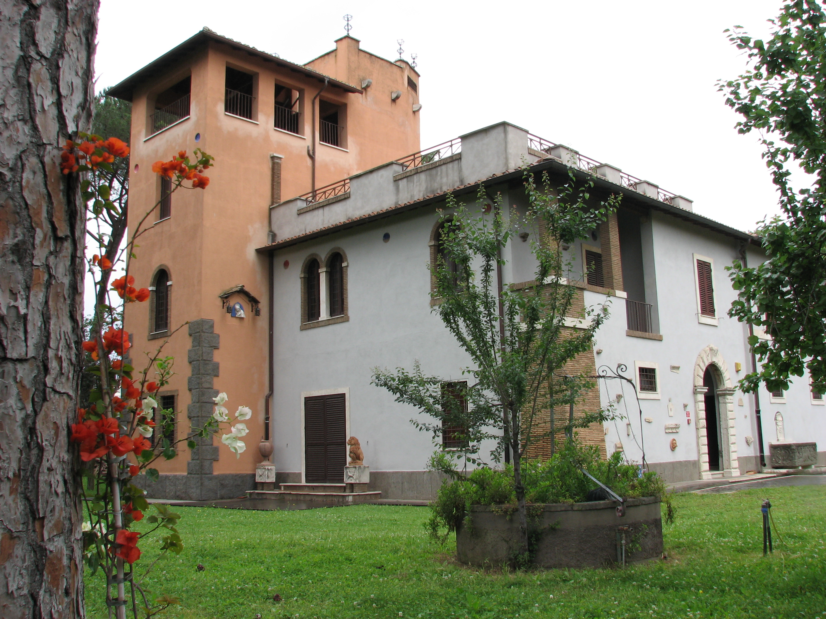 Biblioteca del Pontificio Colegio Pio Latino. Edificio del siglo XIX.